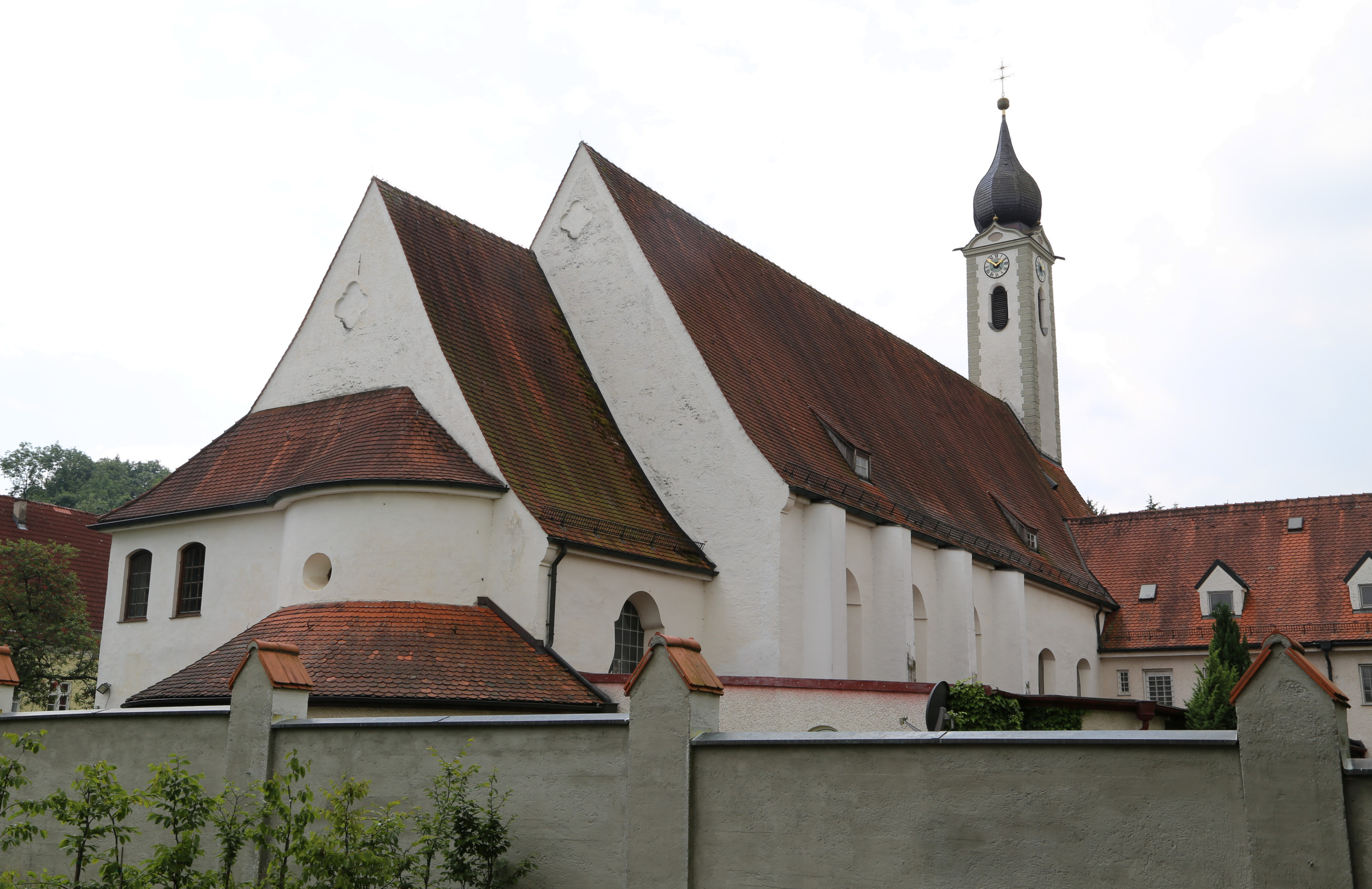 Altenhohenau 10; Dominikanerinnen-Klosterkirche St. Peter und Paul, Saalbau mit eingezogenem Chor und westlichem Dachreiter mit Zwiebelhaube, barocker Neubau um 1670/75 unter Einbeziehung älterer Teile seit 1235, Apsis, Chor und Langhaus- Außenmauern romanisch, Rokoko-Ausbau 1765/74, Turm 1773; mit Ausstattung.